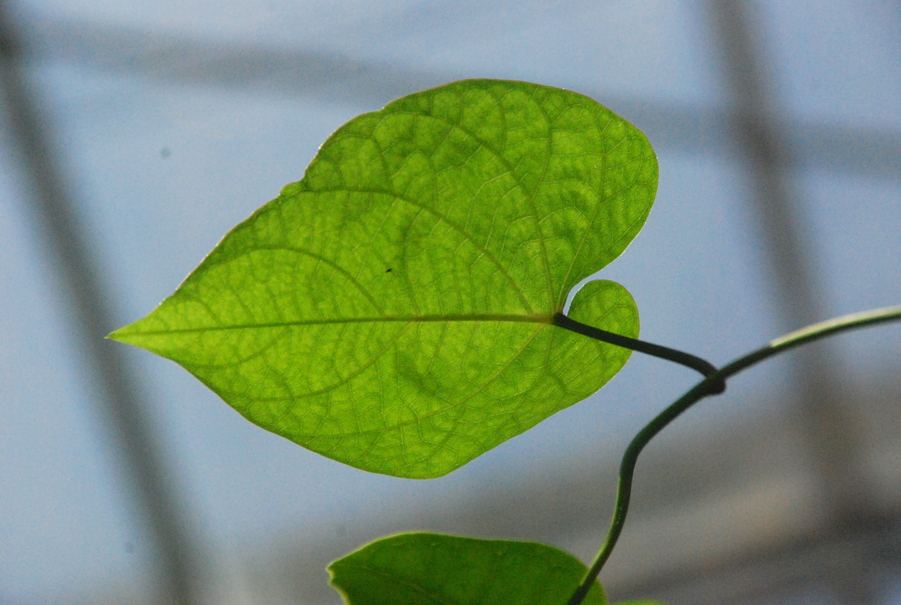 Ipomoea walpersiana, photo prise au Conservatoire national de botanique de Brest à l'occasion du "Wiki takes Conservatoire Botanique National de Brest"